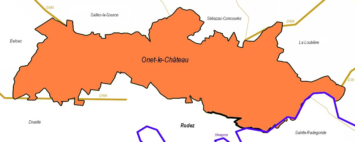 Limites d'Onet-le-Château.